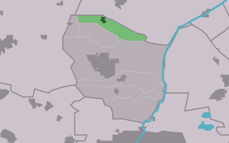 Kaartsje fan himrik fan Hijum